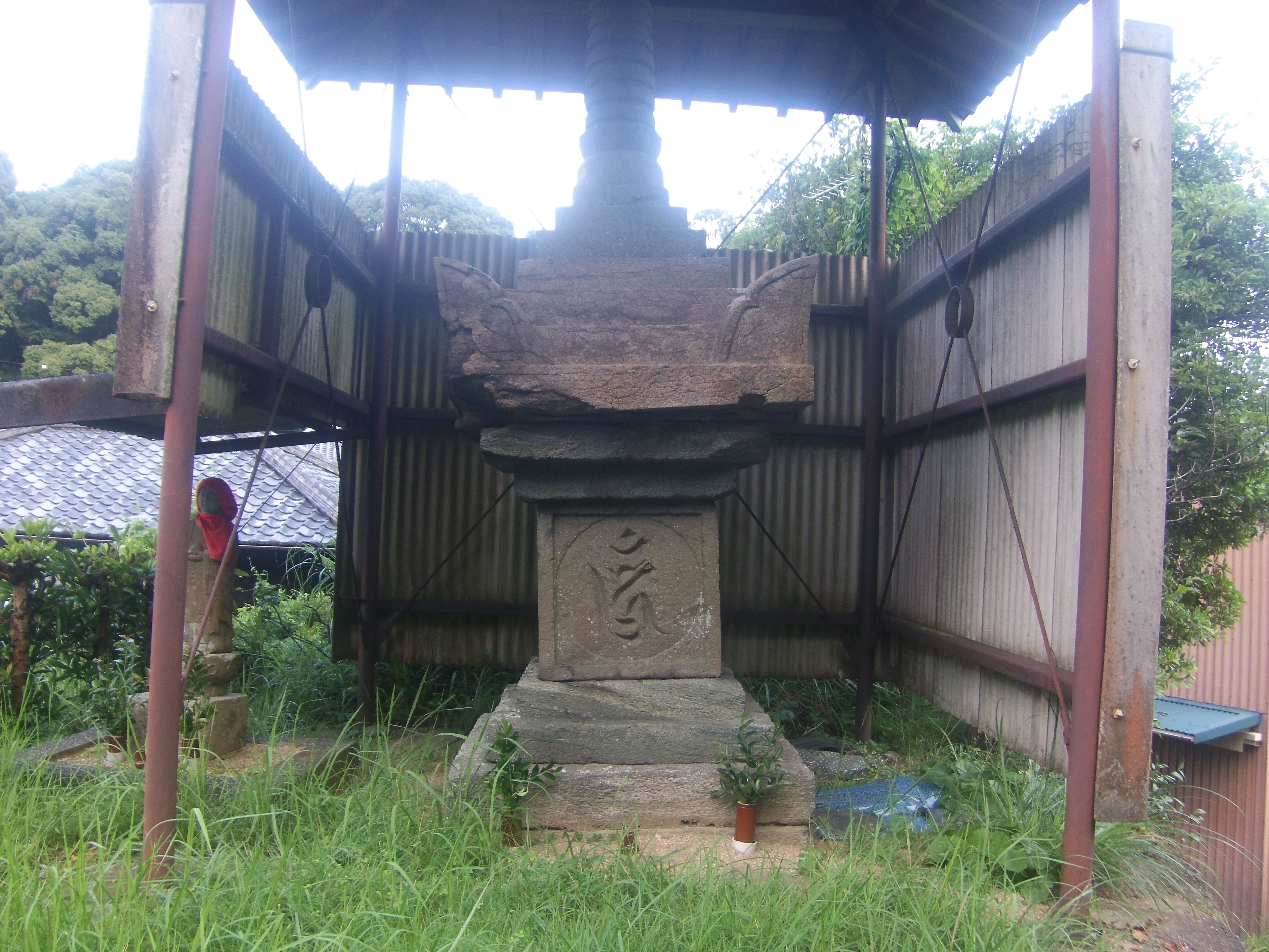 熊野古道・紀伊路の藤白坂の途上にある石造宝塔